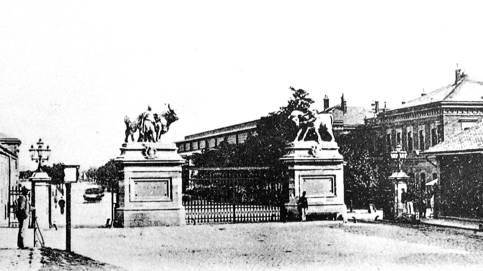 Wien Viehmarkt Sankt Marx 1900